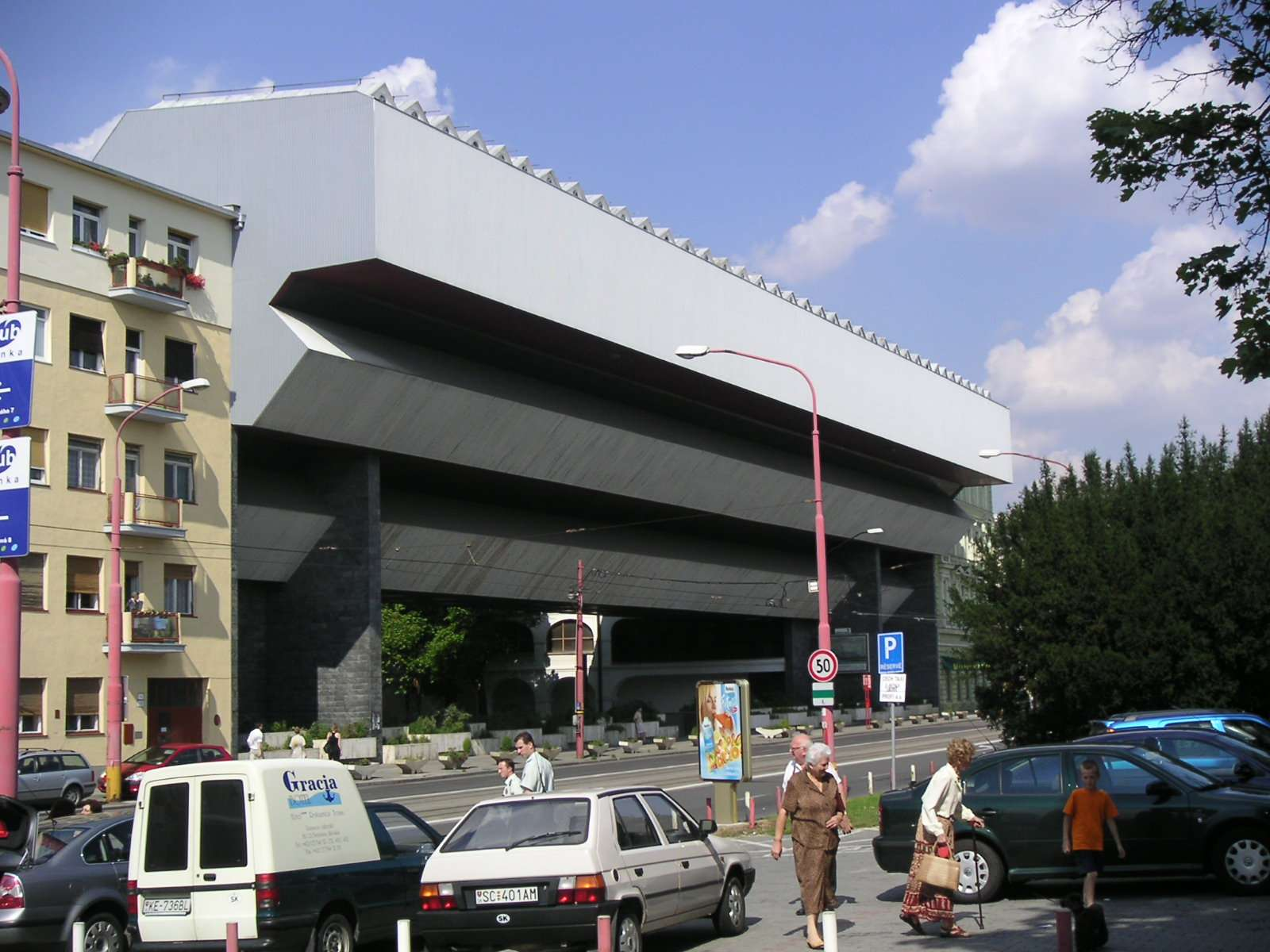 Prístavba Slovenskej národnej galérie v Bratislave z roku 1979 je dielom architekta Vladimíra Dedečka